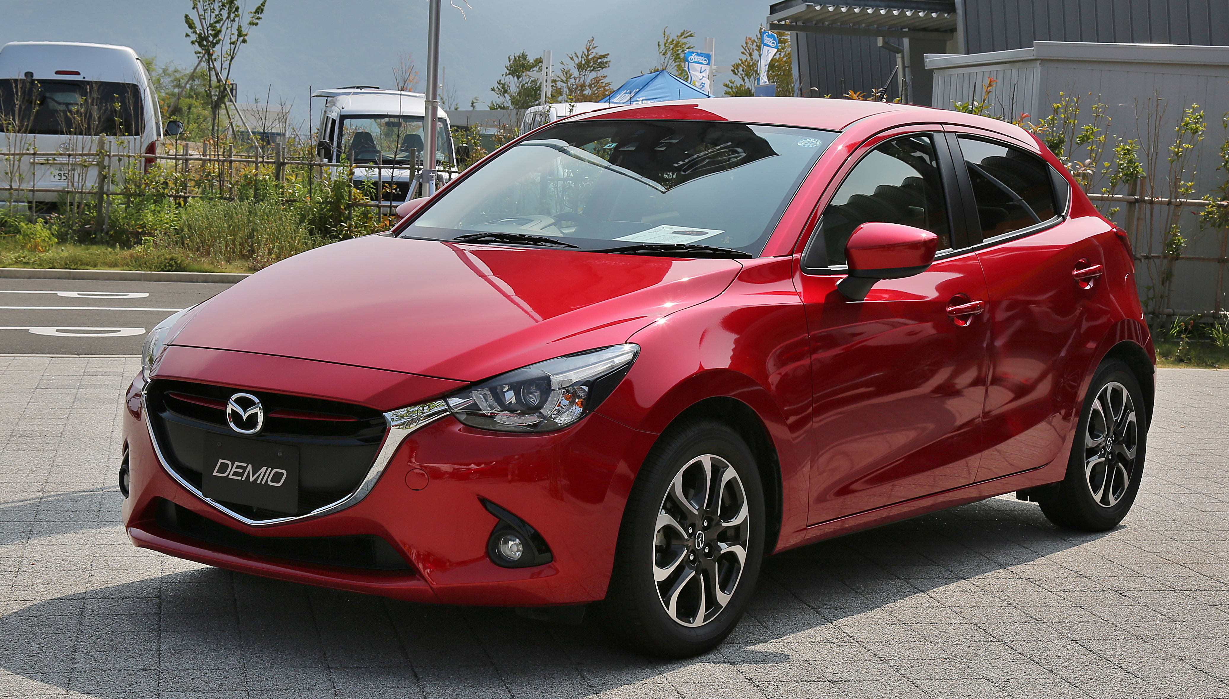 Mazda Demio (DJ)